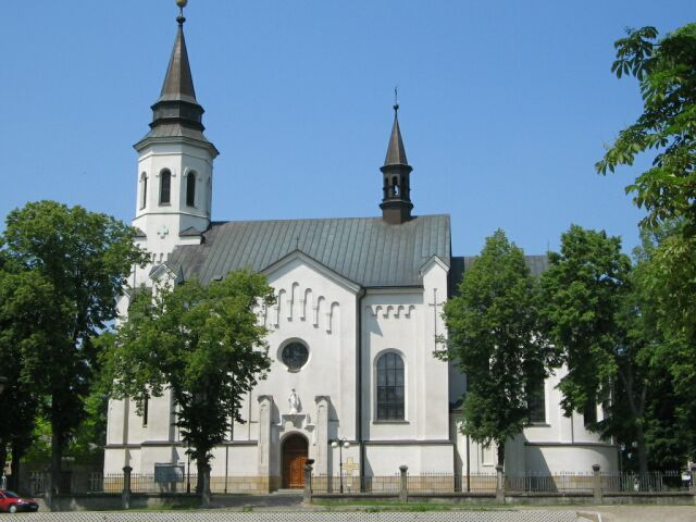 Zręcin - kościół pw. św. Stanisława Biskupa i Męczennika